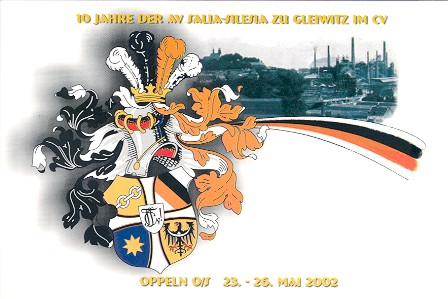 couleurkarte salia silesia gleiwitz oberschlesien studentenverbindung